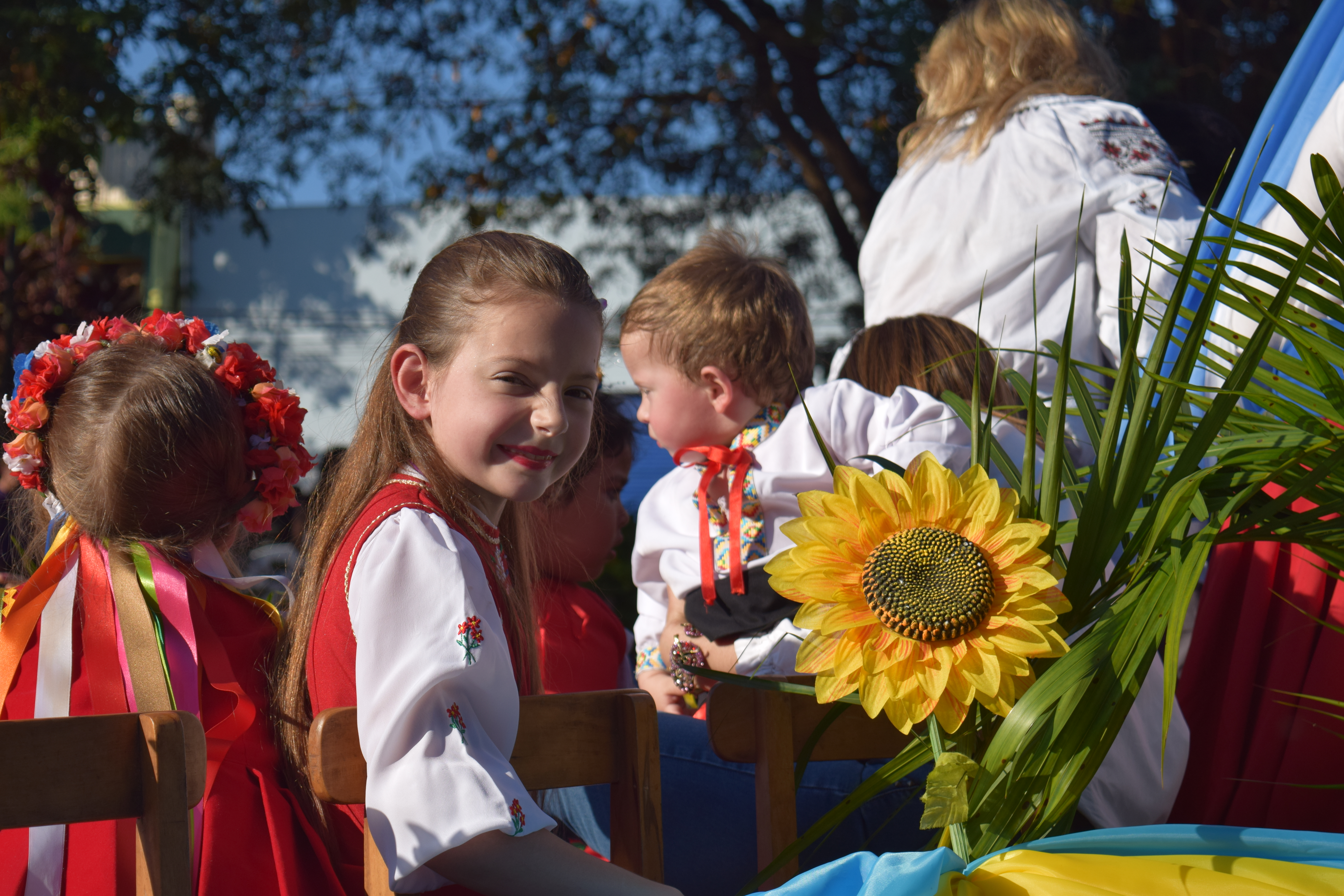 Desfile inaugural de la XXXV Fiesta Nacional del Inmigrante realizada en Septiembre de 2014 en Oberá, provincia de Misiones, Argentina.